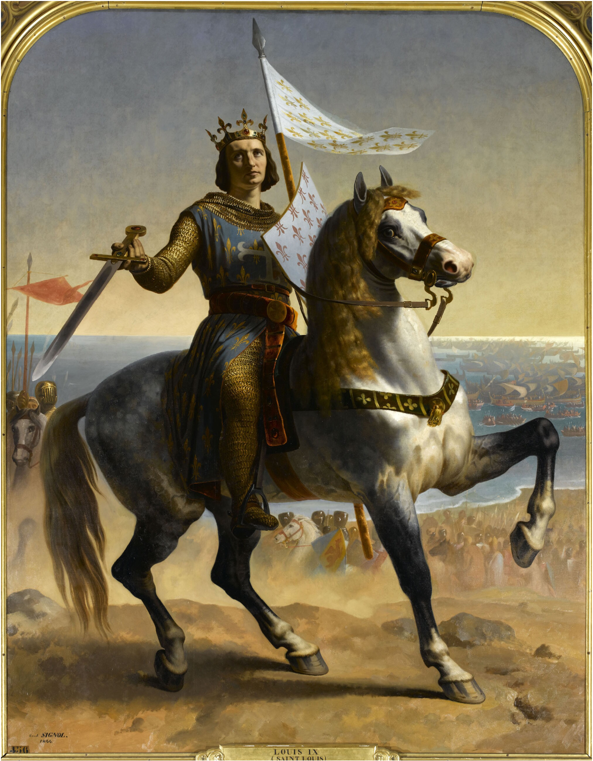 Commandé par Louis-Philippe pour le musée historique de Versailles en 1842